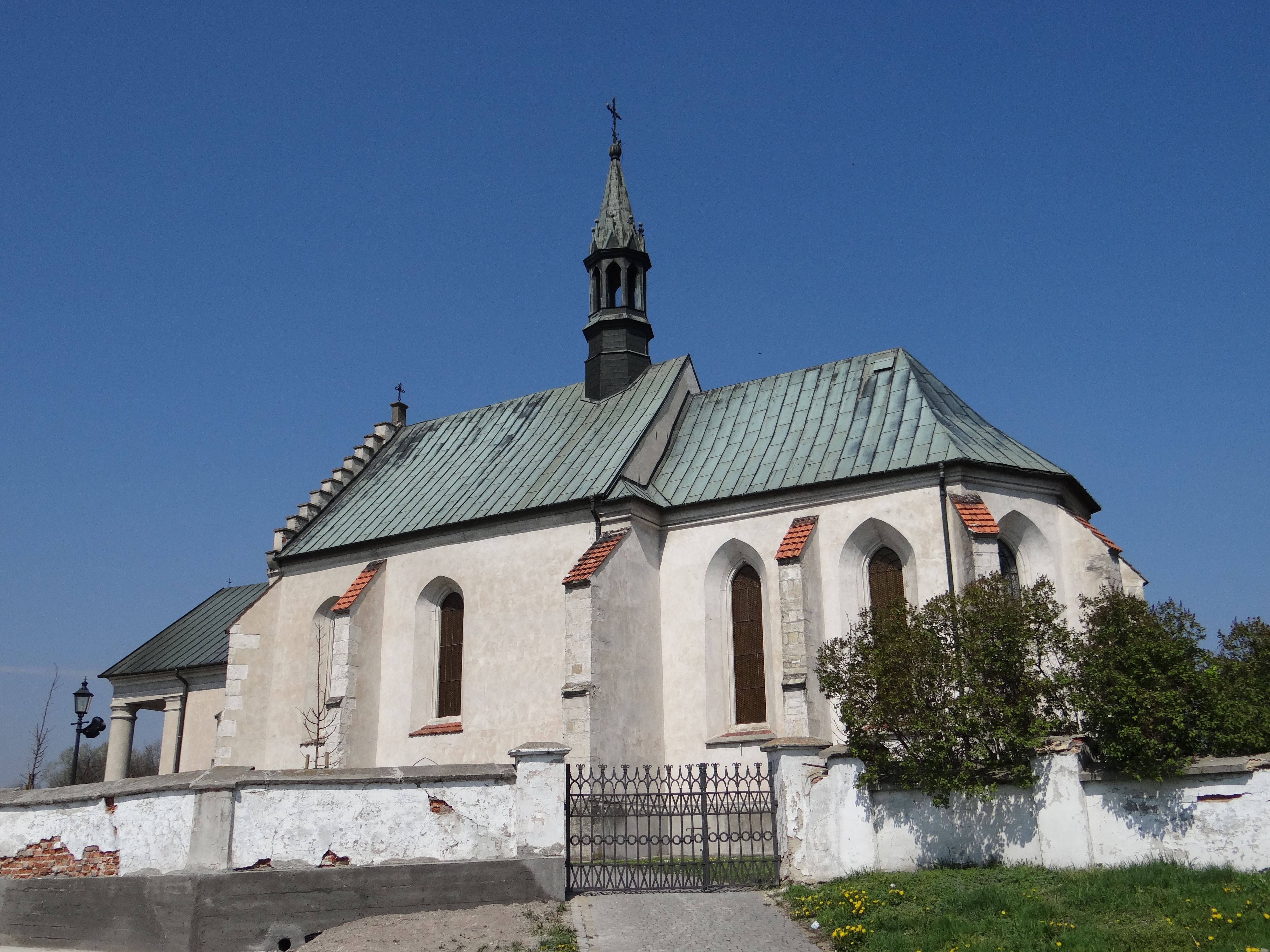 Niedźwiedź, kościół par. pw. św. Wojciecha, 1486-1493, XVI/XVII, XVIII, 1983-1986